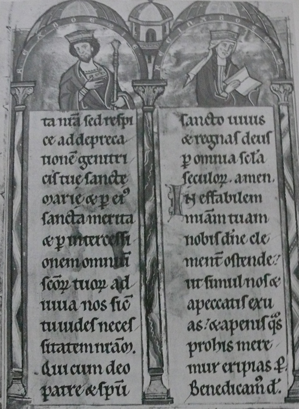 Žaltář Heřmana Durynského